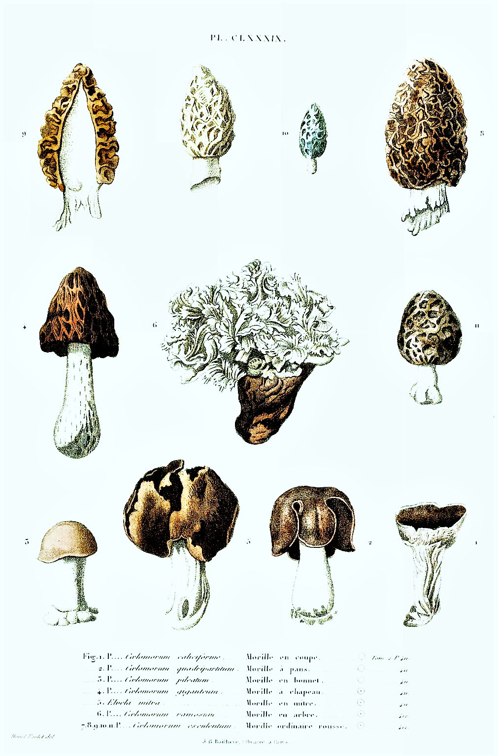 Jean-Jacques Paulet: Ascomycota